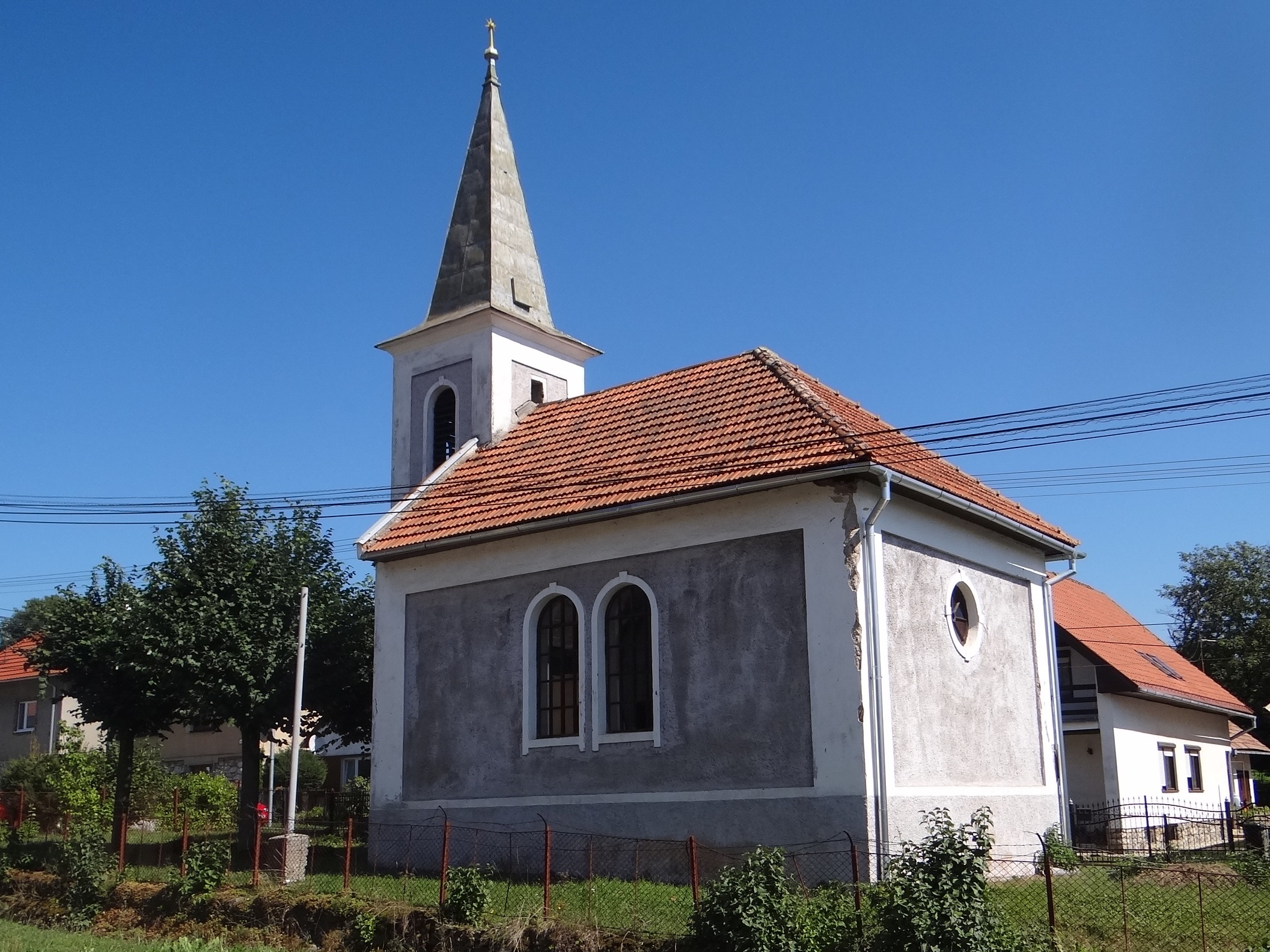 Rudná